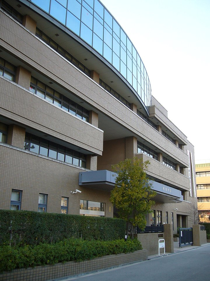 城南学園中学校・高等学校